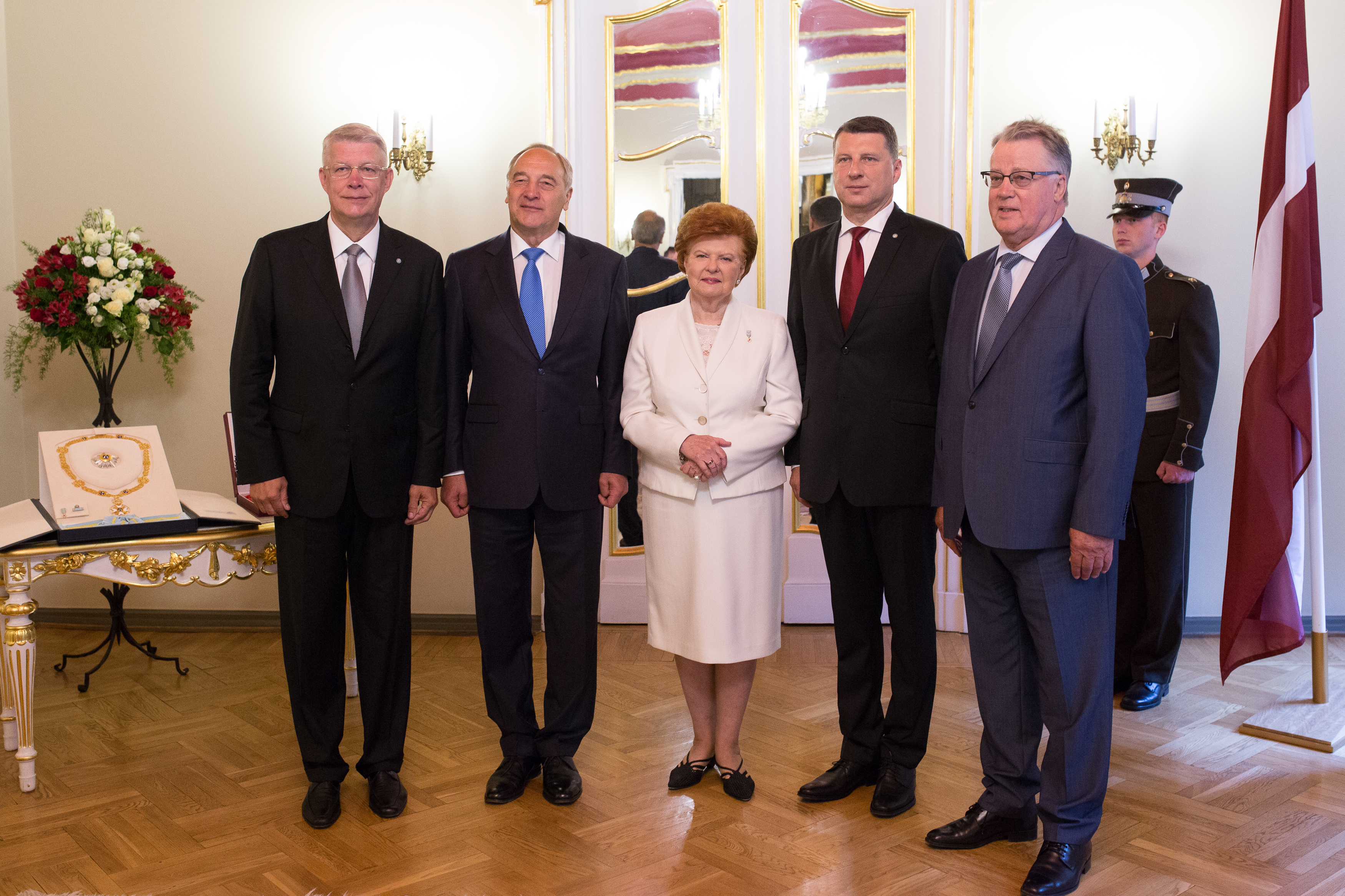 2015.gada 8.jūlijs. Saeimas priekšsēdētāja Ināra Mūrniece svinīgā ceremonijā Valsts prezidentam pasniedz valsts apbalvojumus. Foto: Ernests Dinka, Saeimas Kanceleja Izmantošanas noteikumi: saeima.lv/lv/autortiesibas